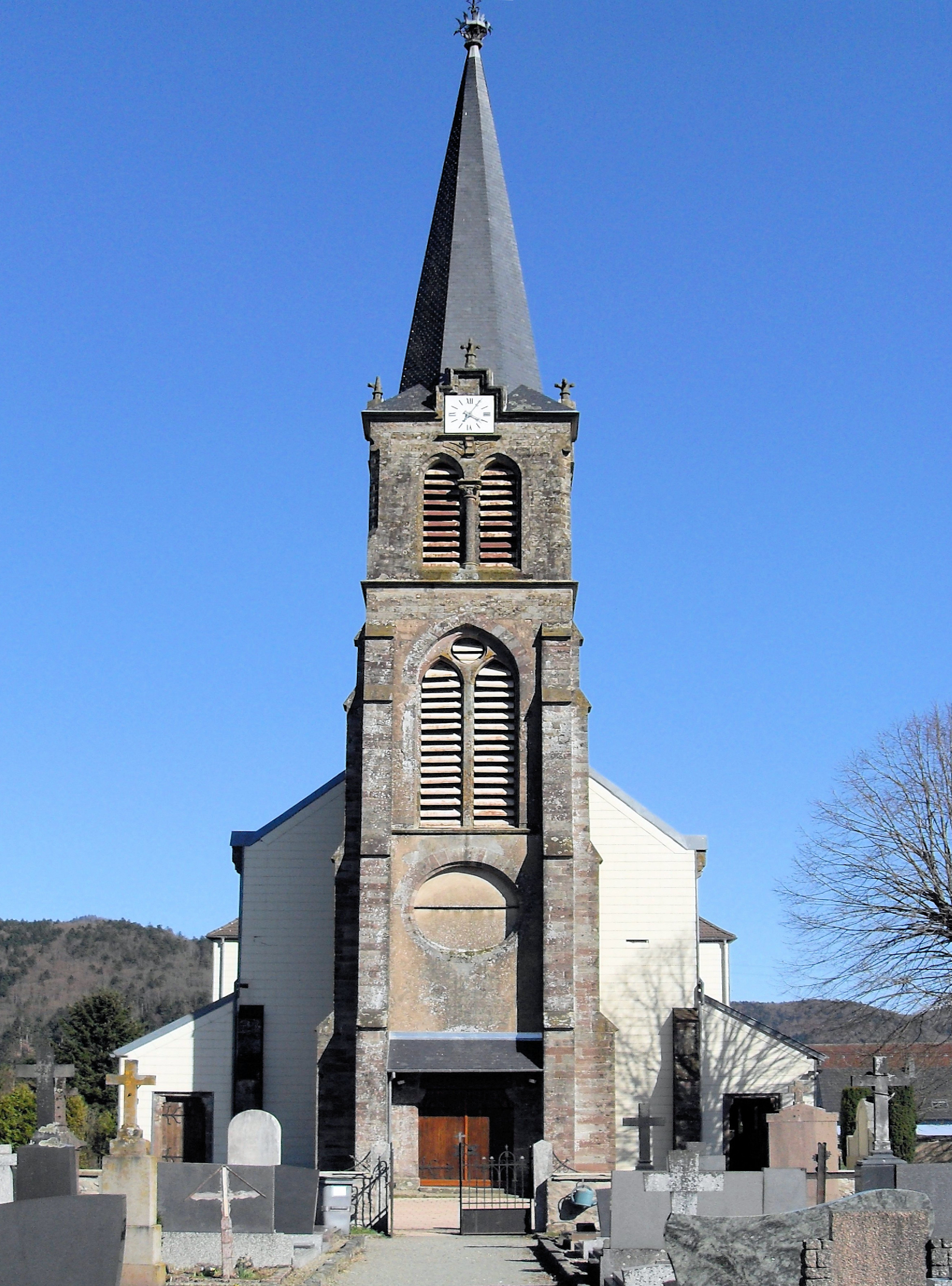 L'église de l'Exaltation-de-la-Sainte-Croix à Dolleren